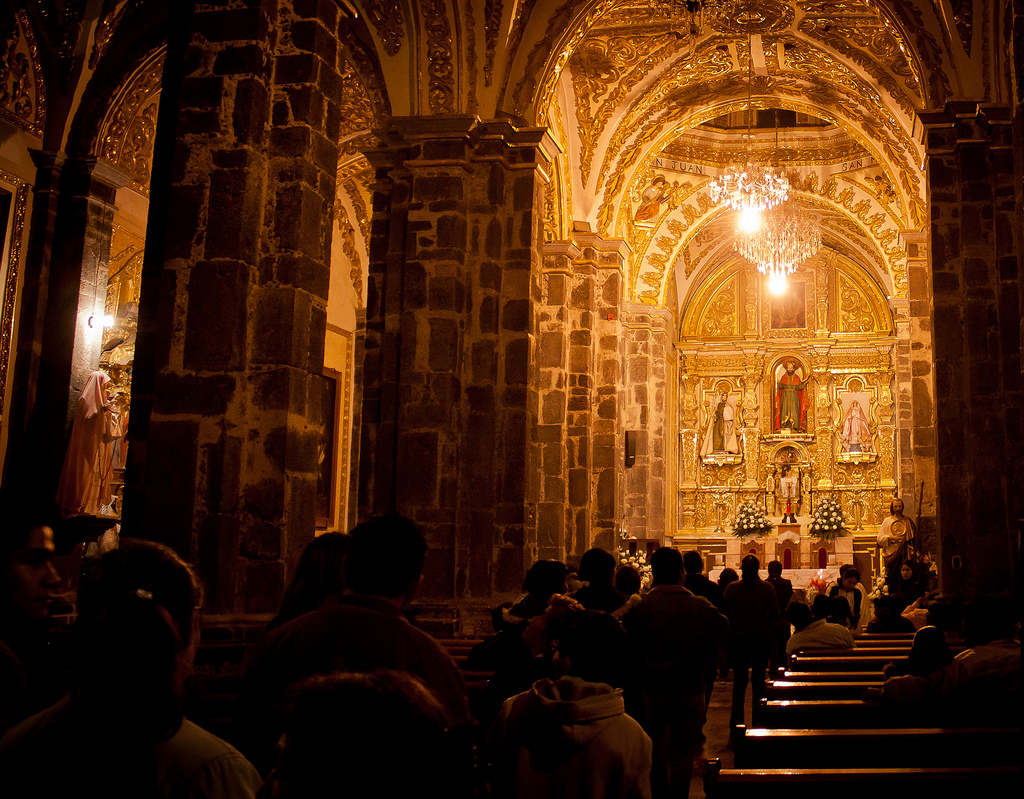 Vista de la nave central del templo de san Andrés Apóstol de Míxquic en Tláhuac (México).